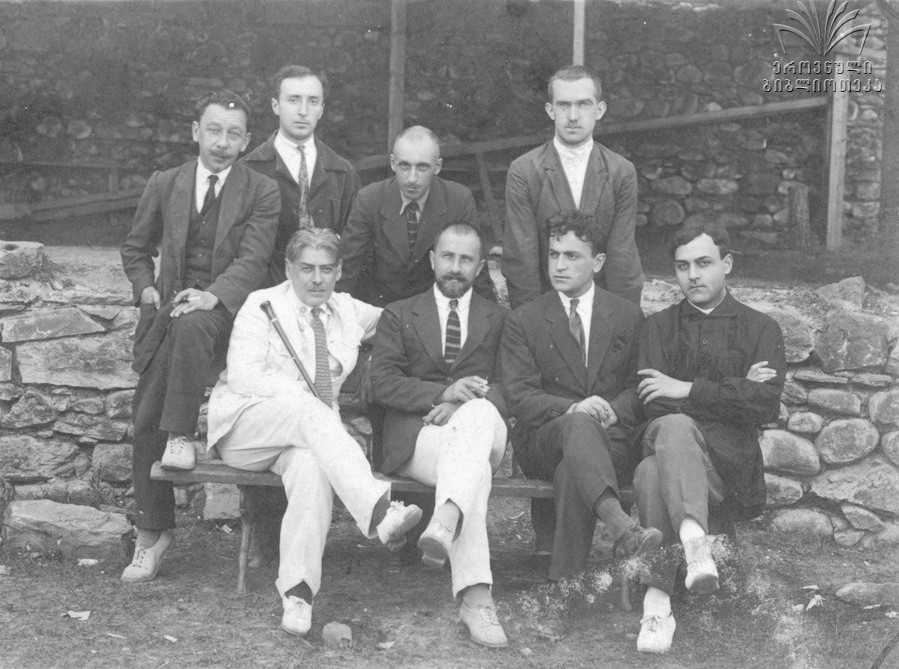 რუსთაველის თეატრის დასი: კოტე მარჯანიშვილი, ვ. სიმონიშვილი, ალექსანდრე ახმეტელი, დ. ჩხეიძე, მიხეილ ქორელი, ა. გველესიანი, ვალერიან სიდამონ-ერისთავი, დოდო ანთაძე. ფოტო გადაღებული ბორჯომში. ორიგინალის ზომა: 90x127.